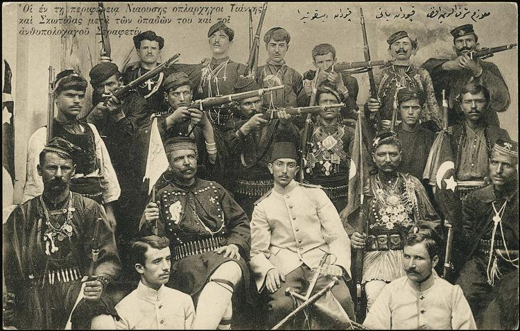 Младотурският офицер Серафетин и четниците на Василиос Ставропулос (капитан Тромарас) - Д. Скотидас (отляво на младотурския офицер) и Янис Симаникас (отдясно на младотурския офицер). Коракас като гръцки офицер не присъства на снимката, униформата му се носи от Скотидас.